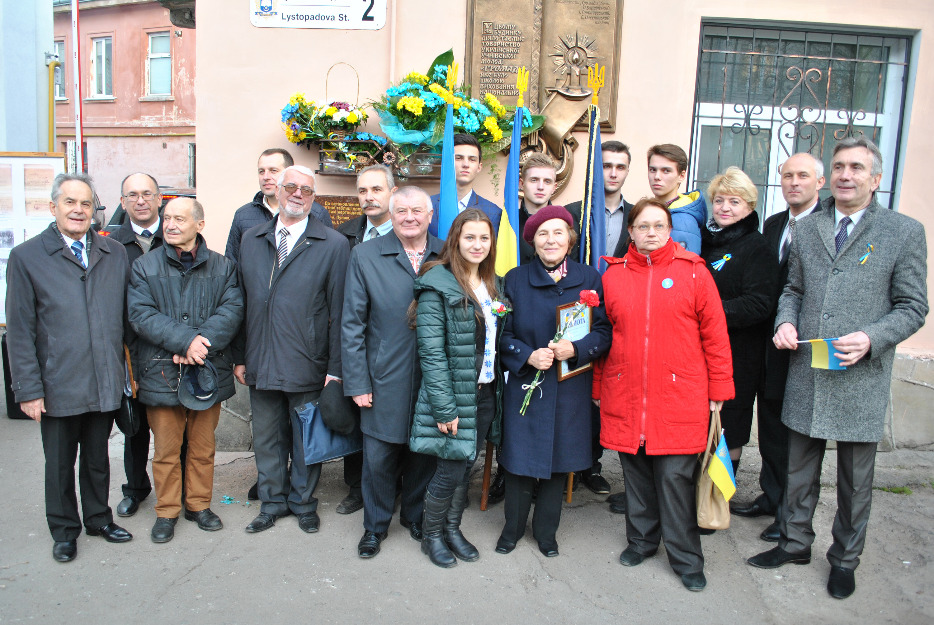 Відкриття першої в Україні меморіальної дошки членам товариства «Громада» на стіні будинку по вул. Листопадовій, 2 у Тернополі. Скульптор Дмитро Пилип'як, архітектор Данило Чепіль. Серед присутніх у першому ряду: Михайло Андрейчин, Ярослав Омелян, Богдан Хаварівський, Євген Безкоровайний, невідома, Ольга Збожна, інші — невідомі.